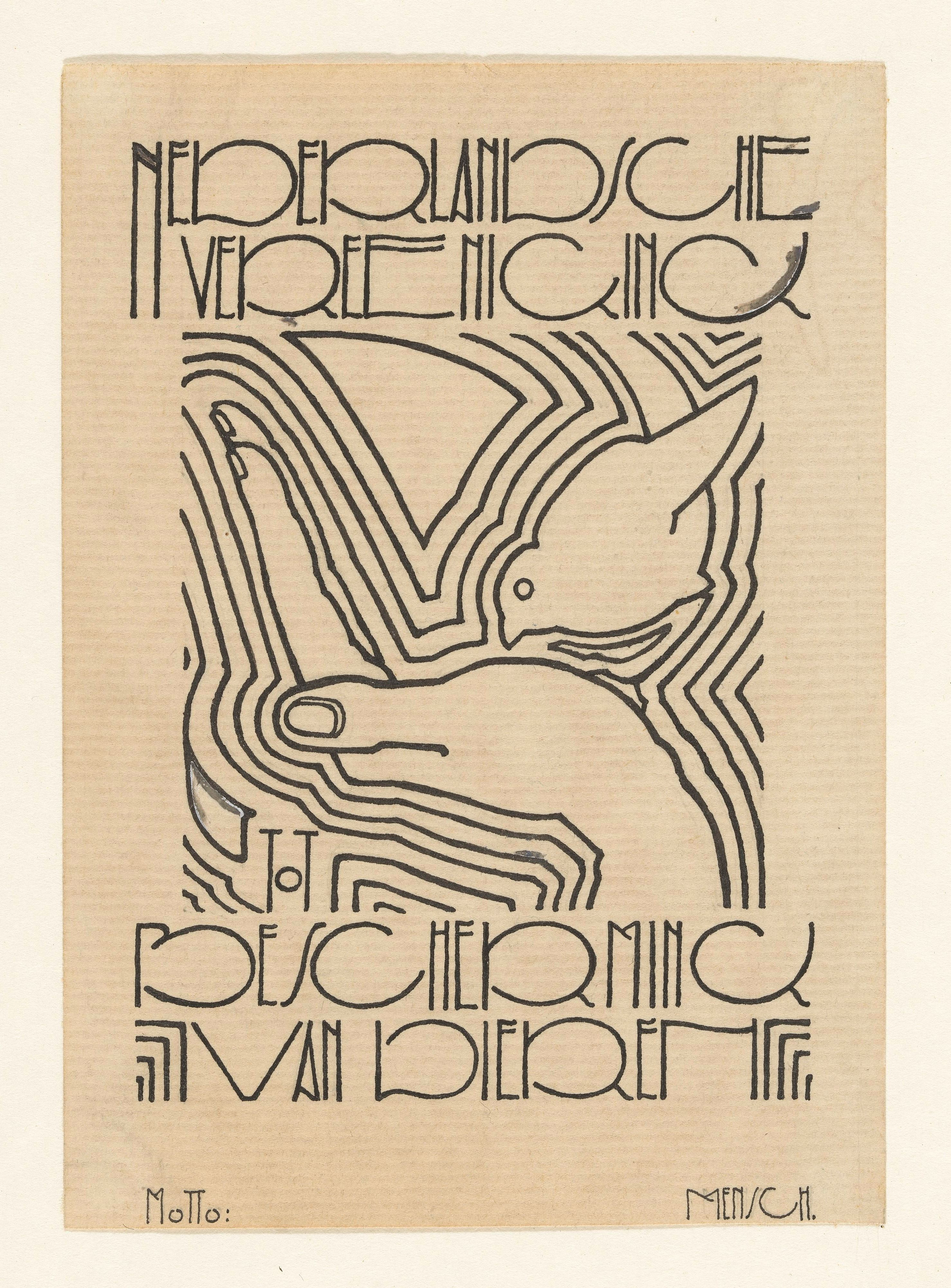 Ontwerp voor vignet voor `Nederlandsche Vereeniging tot Bescherming van Dieren', Reijer Stolk, 1906 - 1945 Objectgegevens Identificatie Titel(s) Ontwerp voor vignet voor `Nederlandsche Vereeniging tot Bescherming van Dieren' Objecttype tekening vignet Objectnummer RP-T-1984-98 Omschrijving Ontwerp voor een prent. Vervaardiging Vervaardiger tekenaar: Reijer Stolk Datering 1906 - 1945 Materiaal en Techniek Fysieke kenmerken pen in zwart, potlood Materiaal papier inkt potlood Techniek pen Afmetingen h 121 mm × b 85 mm Onderwerp Wat vignette names of organizations, companies, trade unions, etc. (NEDERLANDSCHE VEREENIGING TOT BESCHERMING VAN DIEREN) Verwerving en rechten Verwerving aankoop 1984 Copyright Publiek domein